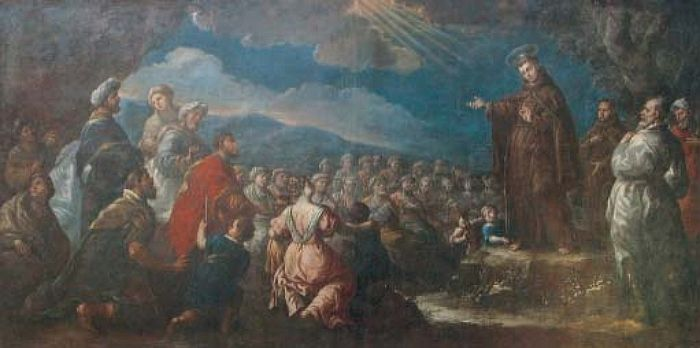 Alonso del Arco, Predicación de san Antonio de Padua, óleo sobre lienzo, 249 x 503 cm.